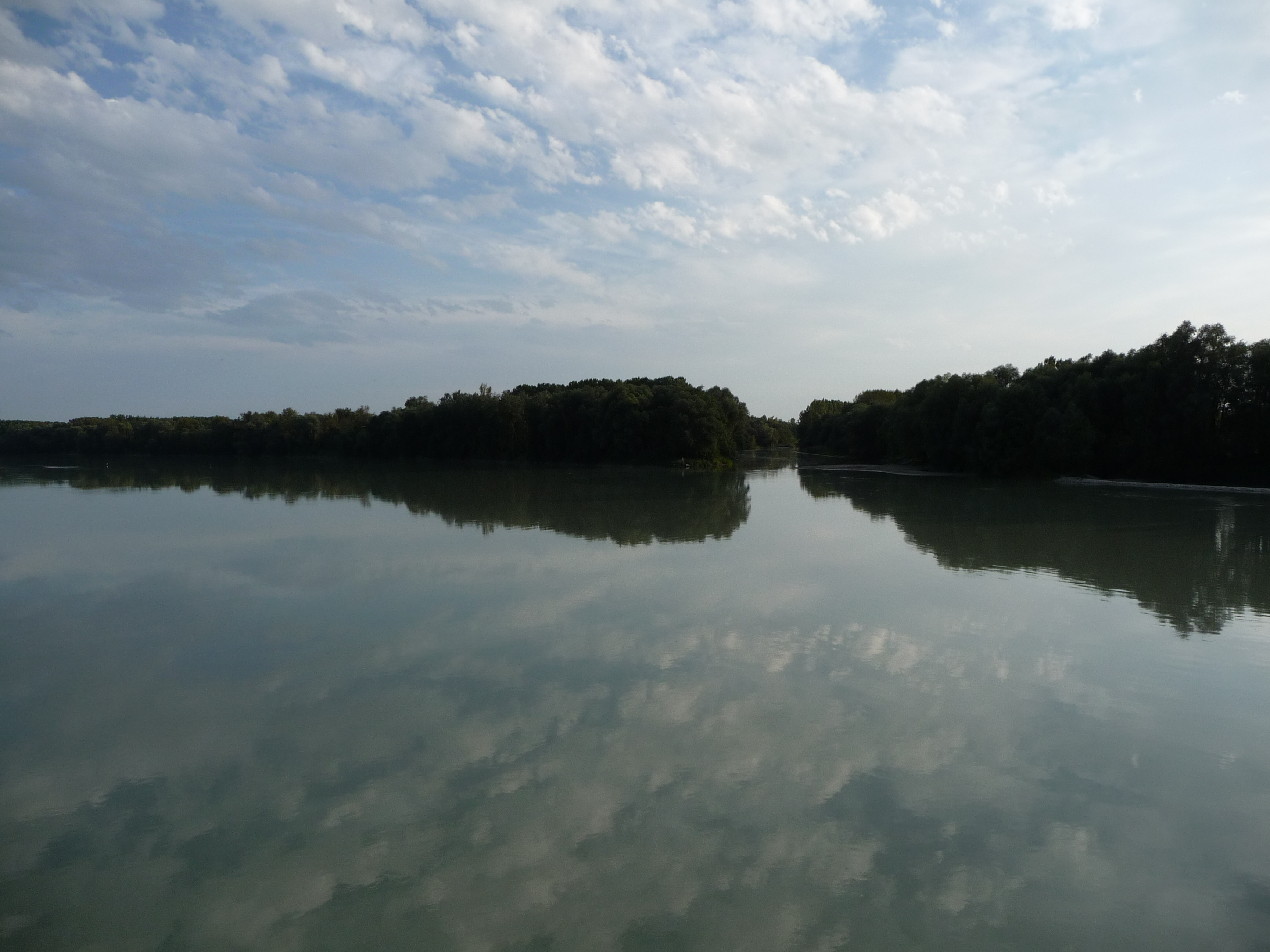 Rottmündung bei Schärding